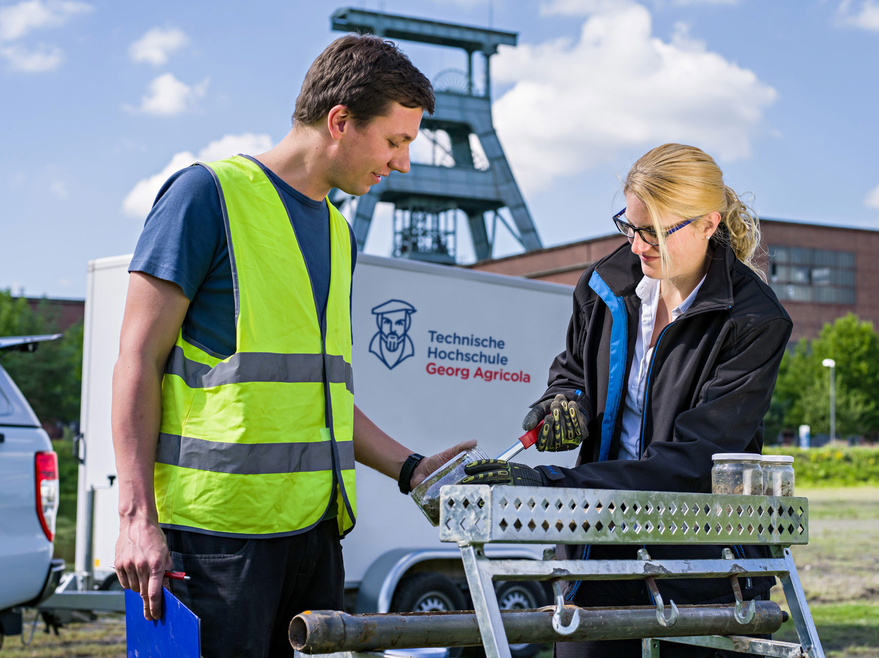 Ingenieurstudenten am Forschungszentrum Nachbergbau - Technische Hochschule Georg Agricola Bochum - Foto Volker Wiciok